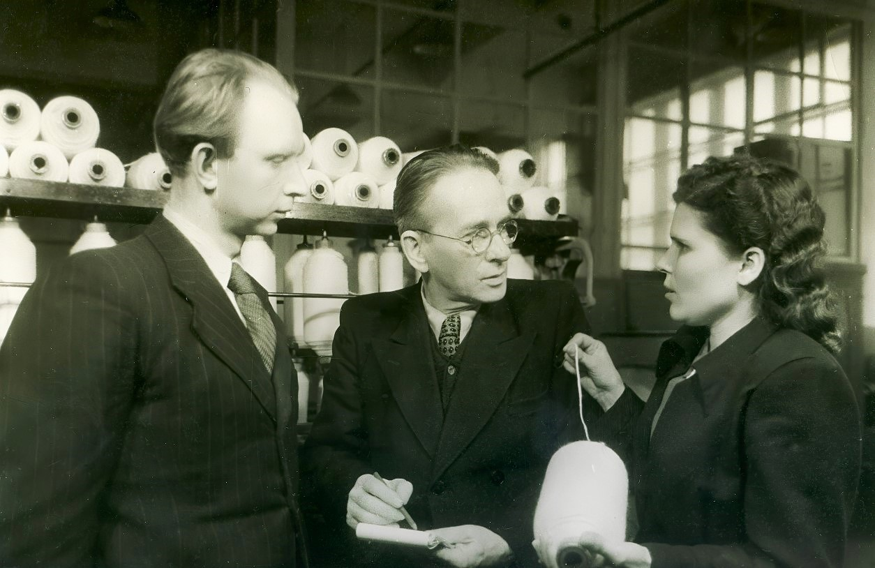 Профессор Зотиков Владимир Евгеньевич (1887-1970)